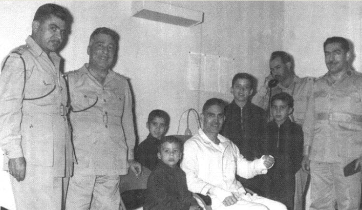 عبد الكريم قاسم في المستشفى جراء محاولة أغتيال